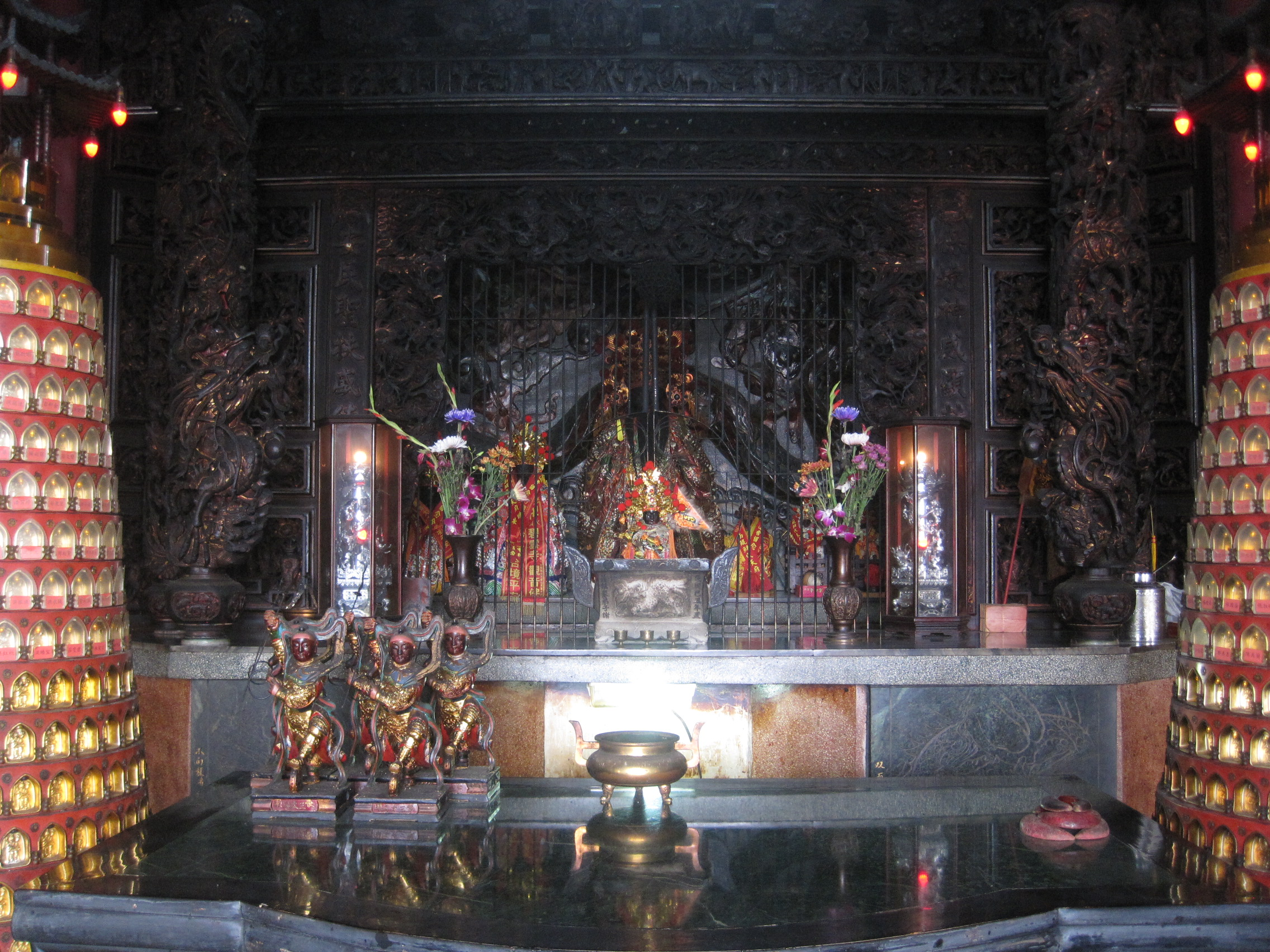 中文（台灣）: 後鎮保安宮內部